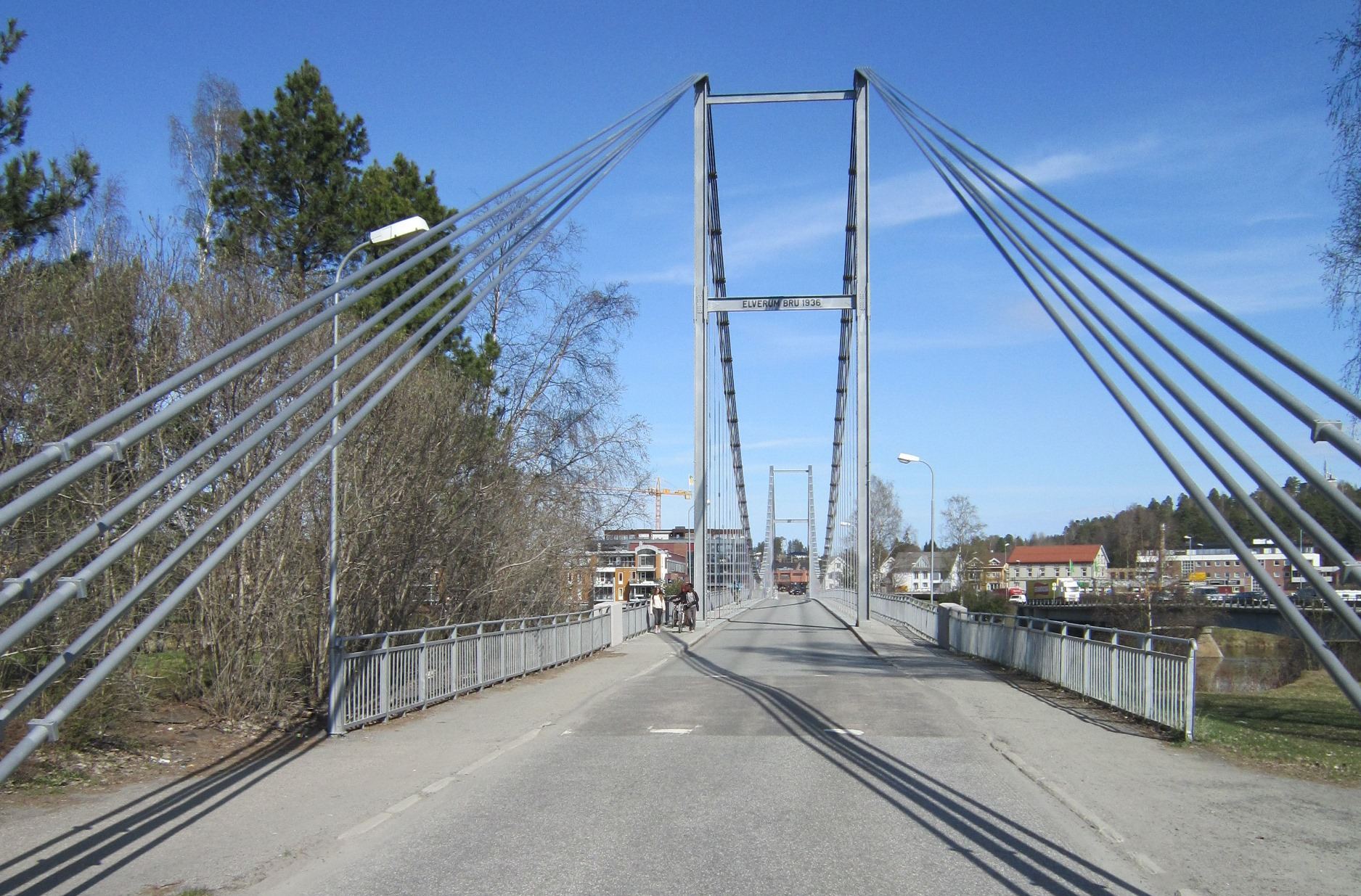 Nybrua i Elverum